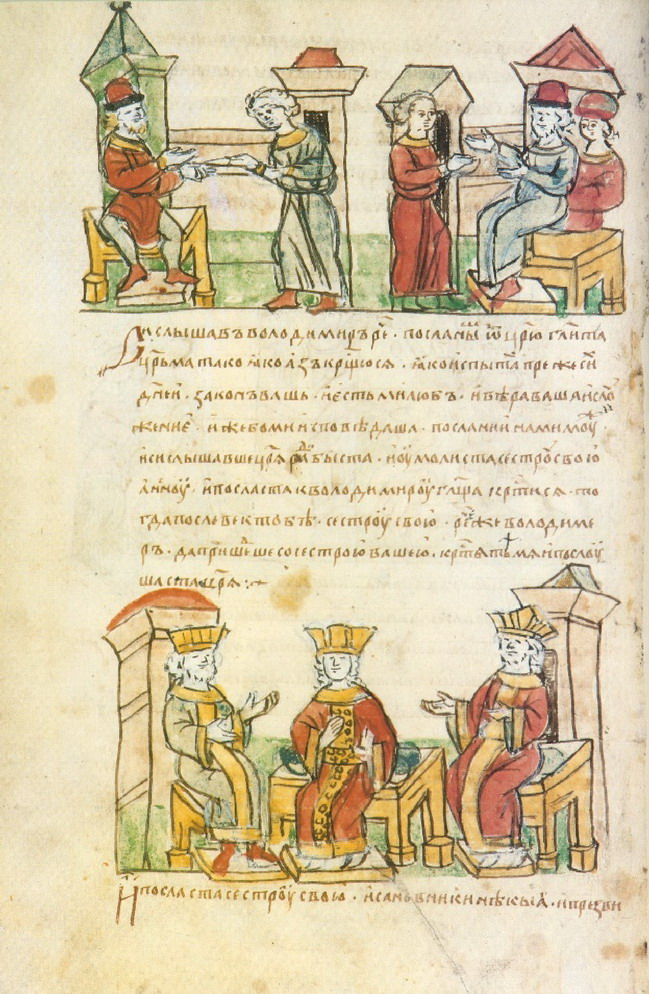 Радзивилловская (Кёнигсбергская) летопись.